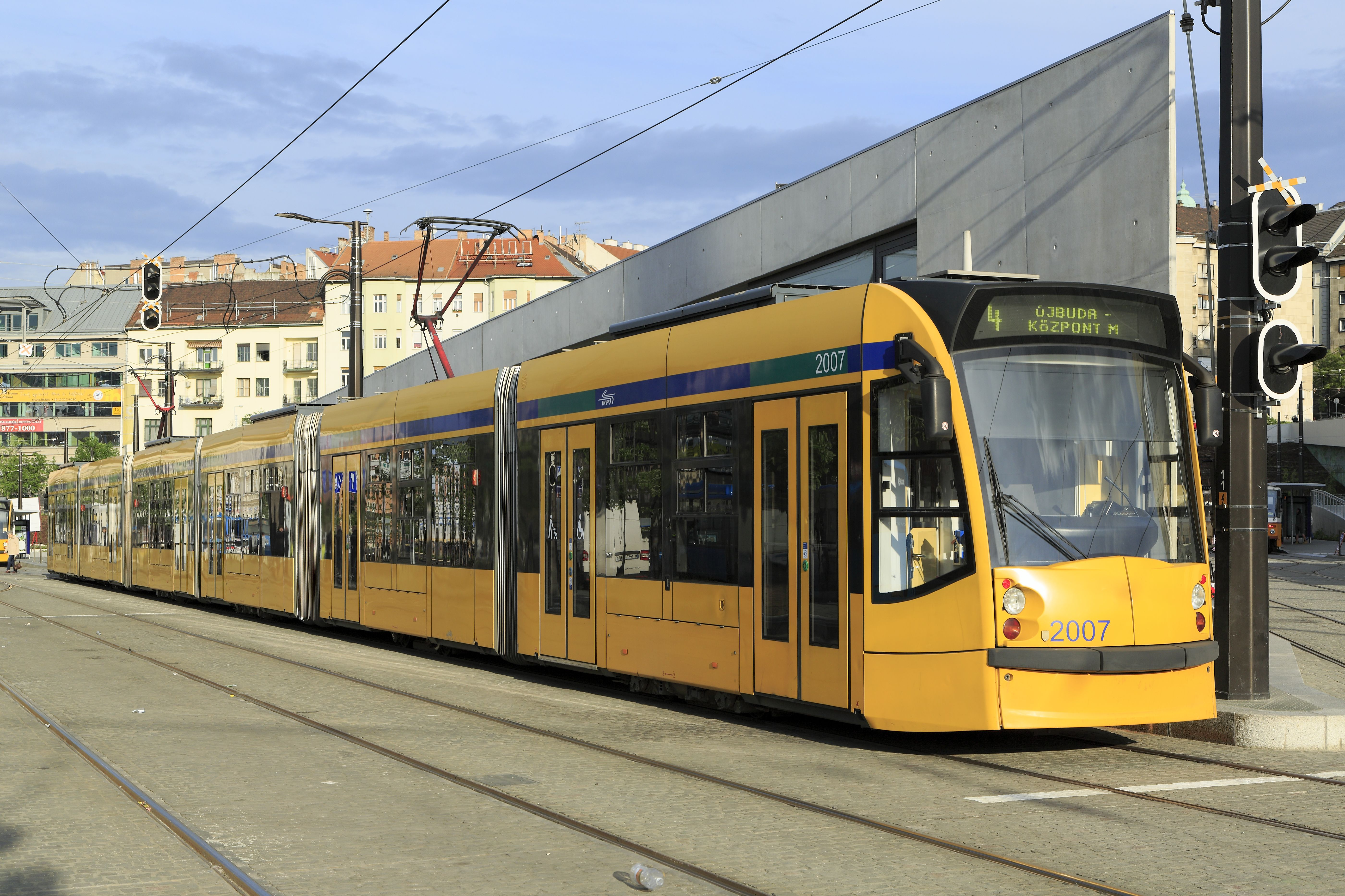 Am Abfahrtsbahnsteig der Linien 4 und 6 Richtung Osten, der Zug der Linie 4 wird nach Újbuda-Központ fahren.Die Budapester Combino Plus bestehen im Prinzip aus drei niederflurigen Kurzgelenkwagen, die Gelenke zwei und vier bieten deutlich mehr Freiheitsgrade.